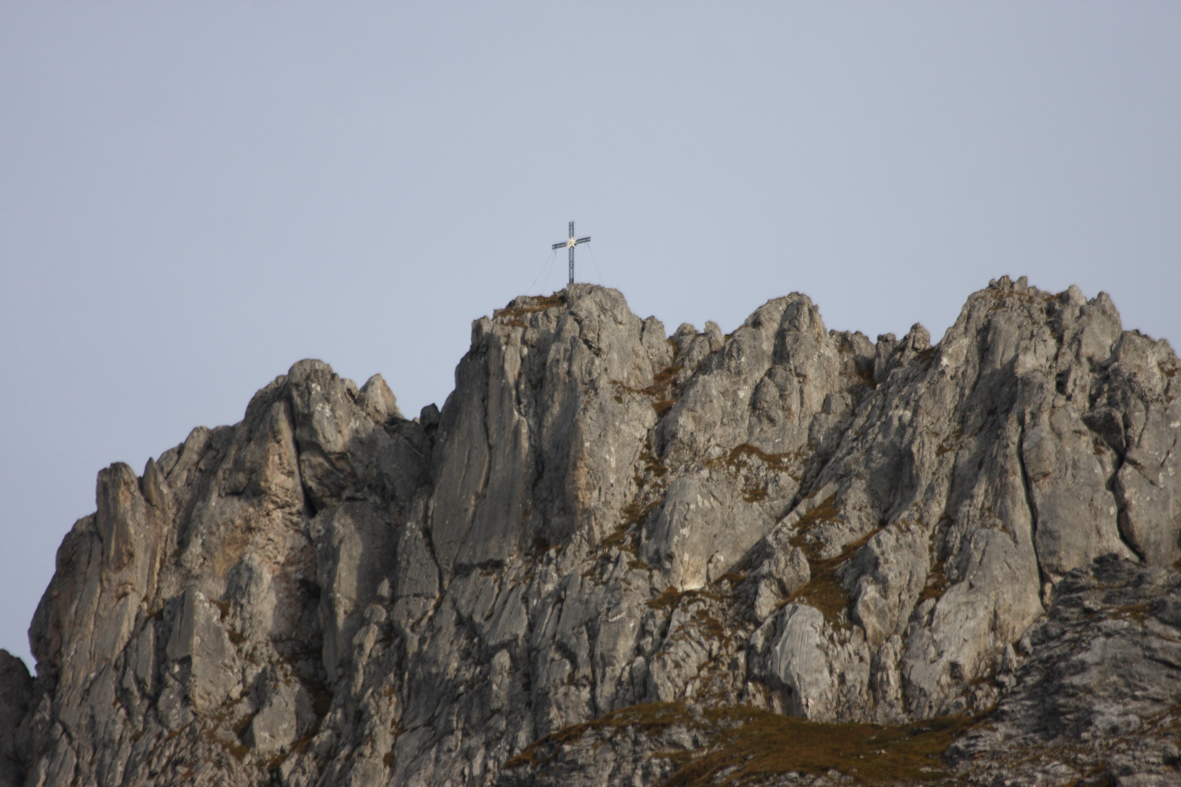 die Kammspitze 2139 m, Gröbming, Steiermark, Austria